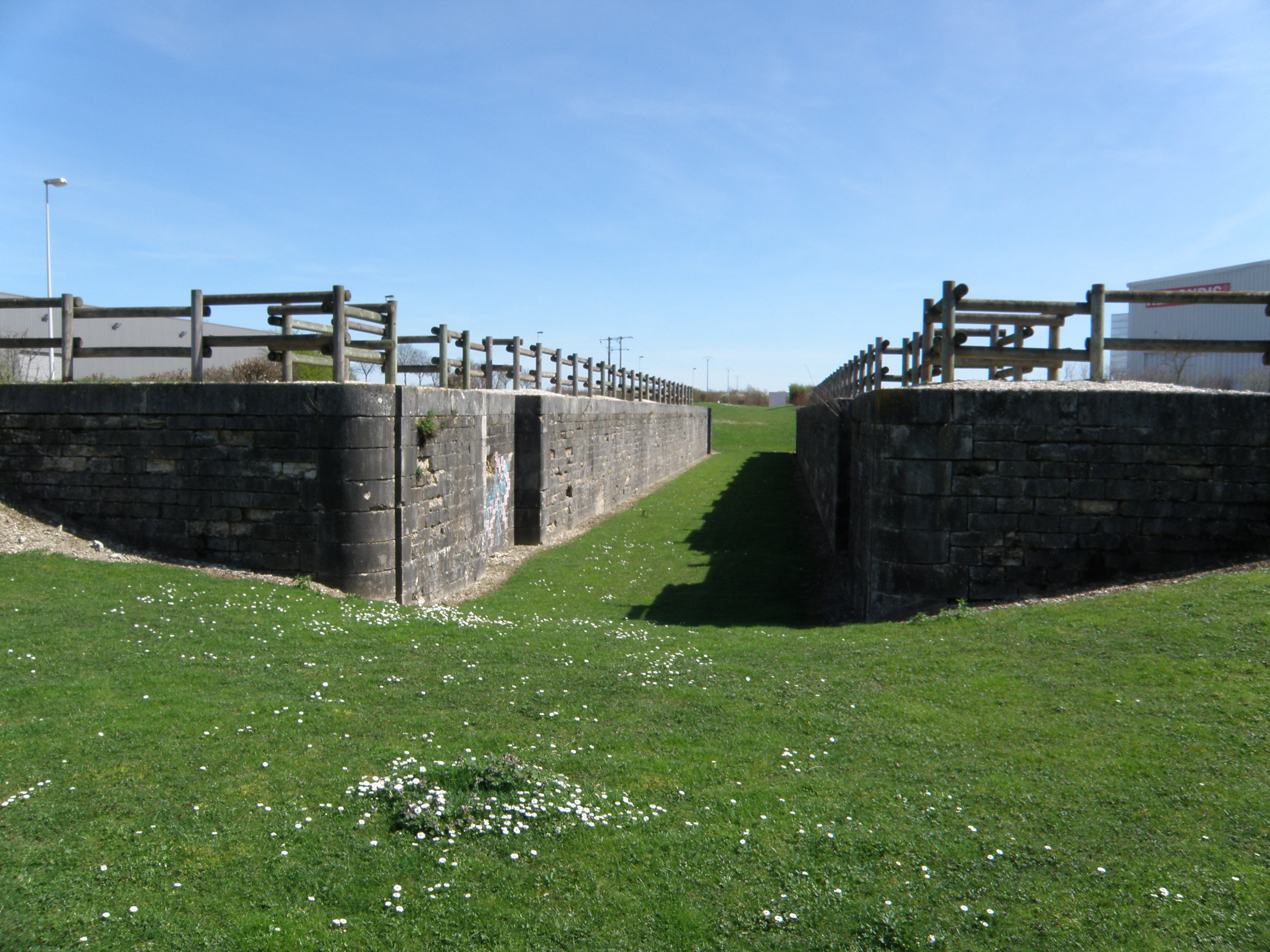 Écluse de Villebertin sur l'ancien canal de la Haute-Seine 10800 Buchères